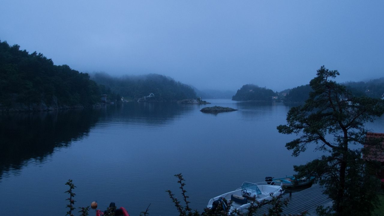 Trysnes on a grey day